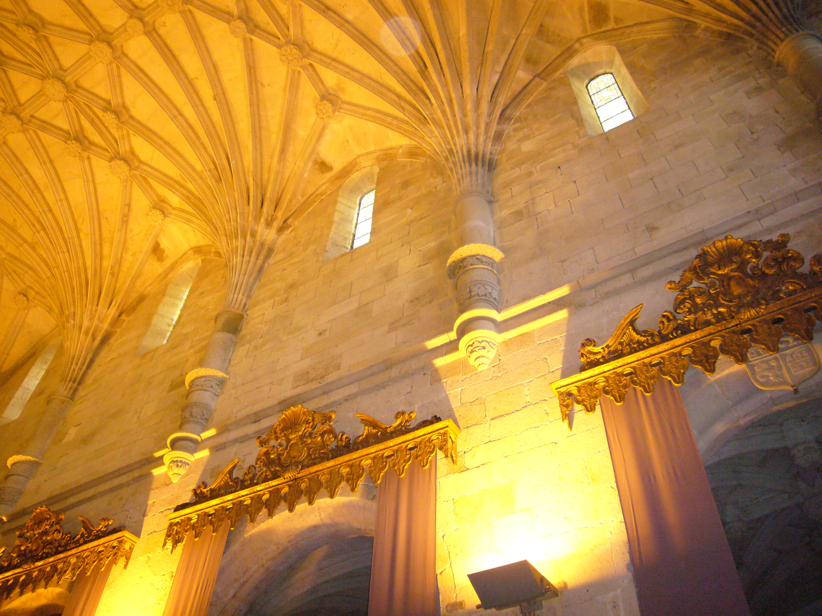 Pormenor do corpo da Igreja de Vilar de Frades (mísulas)